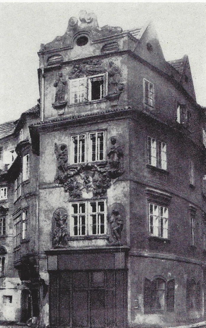 Haus „Bei dem goldenen Brunnen“ mit dem Lokal der Weinhandlung Czarda in der großen Karlsgasse 175, Prag. Kneiplokal des Corps Rugia.